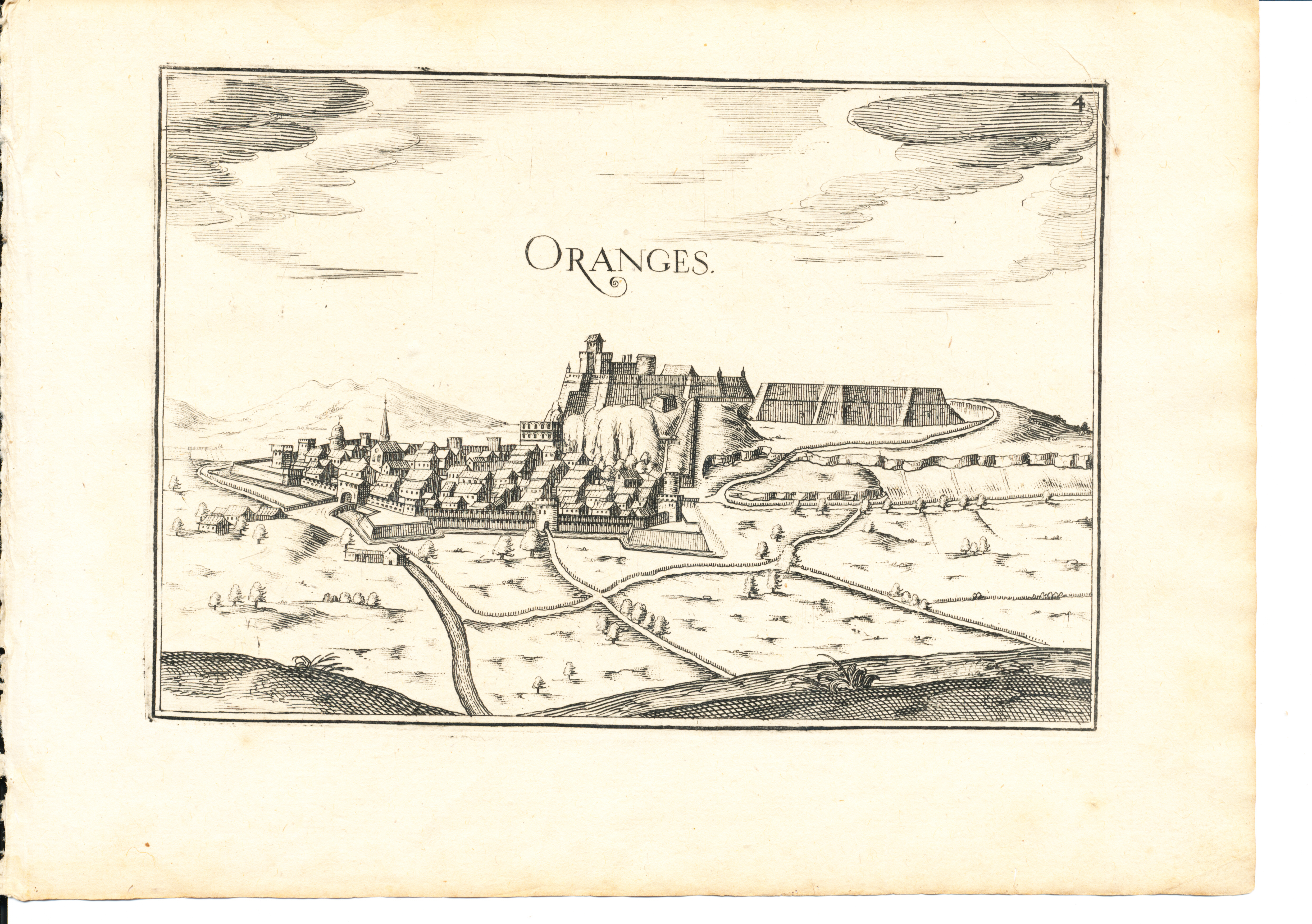 Gravure extraite de "Les Plans et Profils de toutes les principales villes et lieux considérables de France. par le Sieur TASSIN, géographe ordinaire de sa Majesté. A paris, Chez Melchior Tavernier, en l'Isle du Palais. 1634" (Principauté d'Orange & Comtat Venaissin)